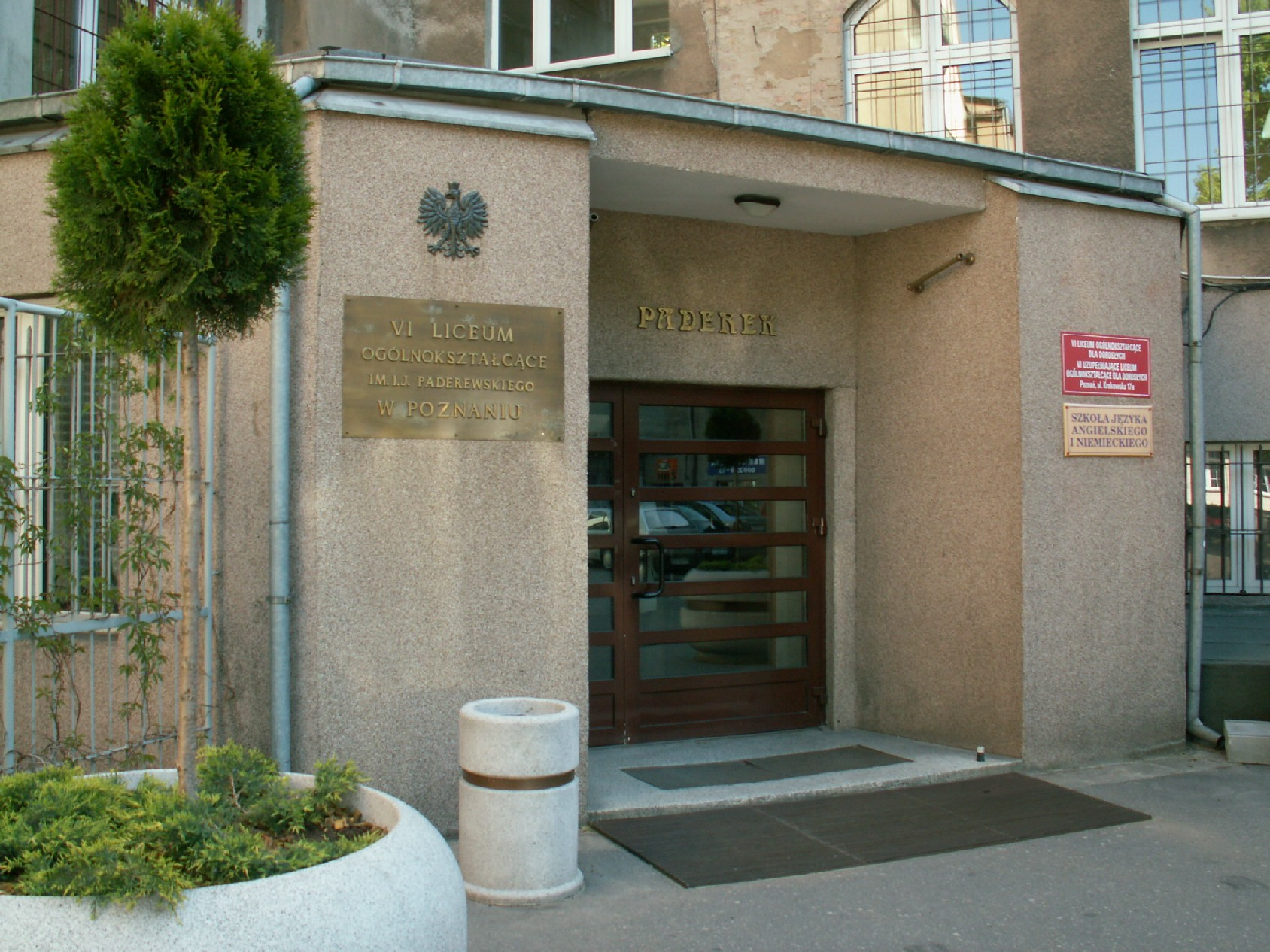 Wejście do VI Liceum Ogólnokształcącego w Poznaniu